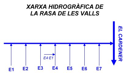 Esquema de la xarxa hidrogràfica de la Rasa de les Valls, a la Vall de Lord.